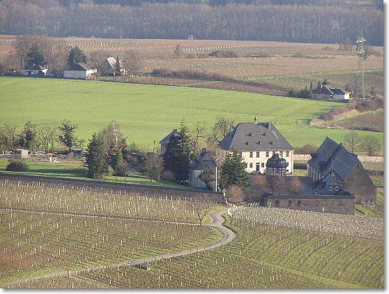 Blick auf den Neuhof vom Steinberg in Hattenheim am Rhein